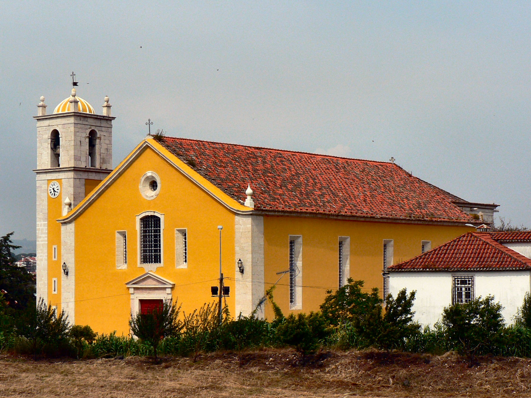 Igreja Matriz de Loures